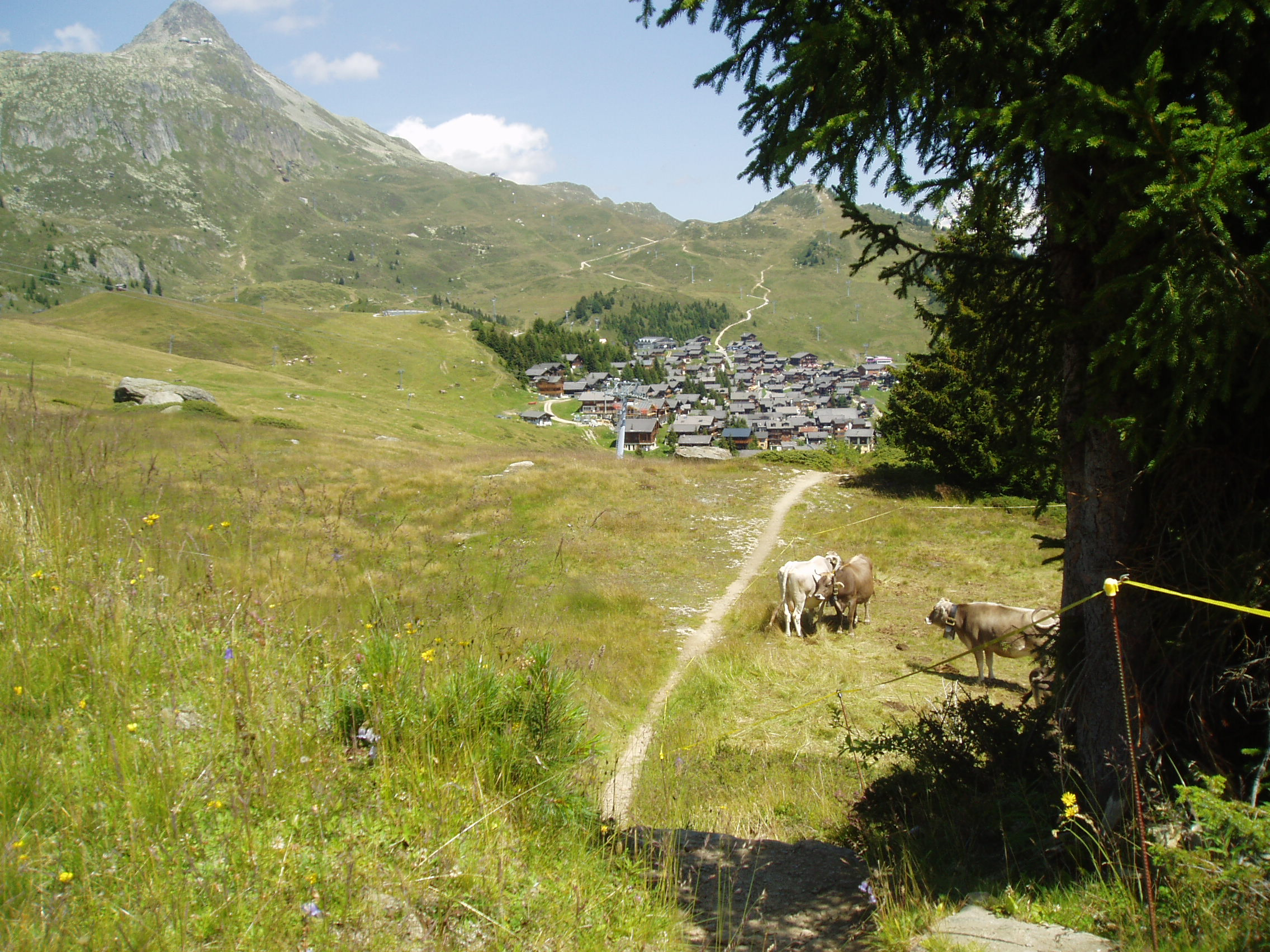 Sentier de liaison entre pâturage et chalet, Bettmeralp, Suisse